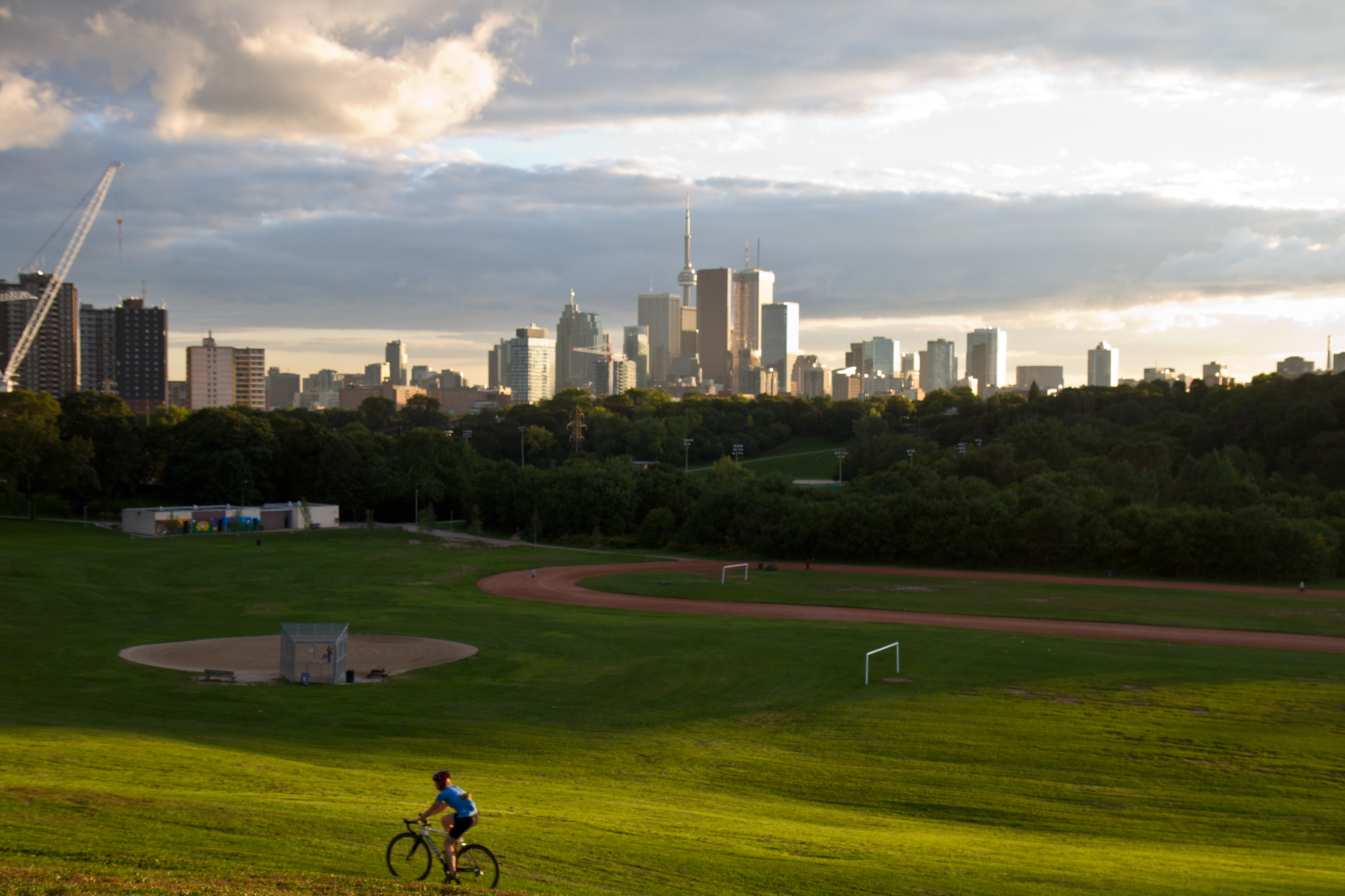 Toronto skyline, as seen from Riverdale Park.